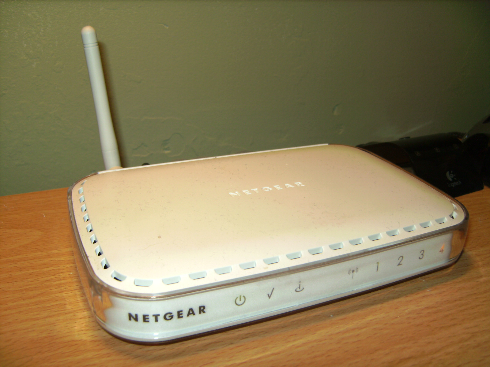 My Netgear DG834G Wireless ADSL Modem Router